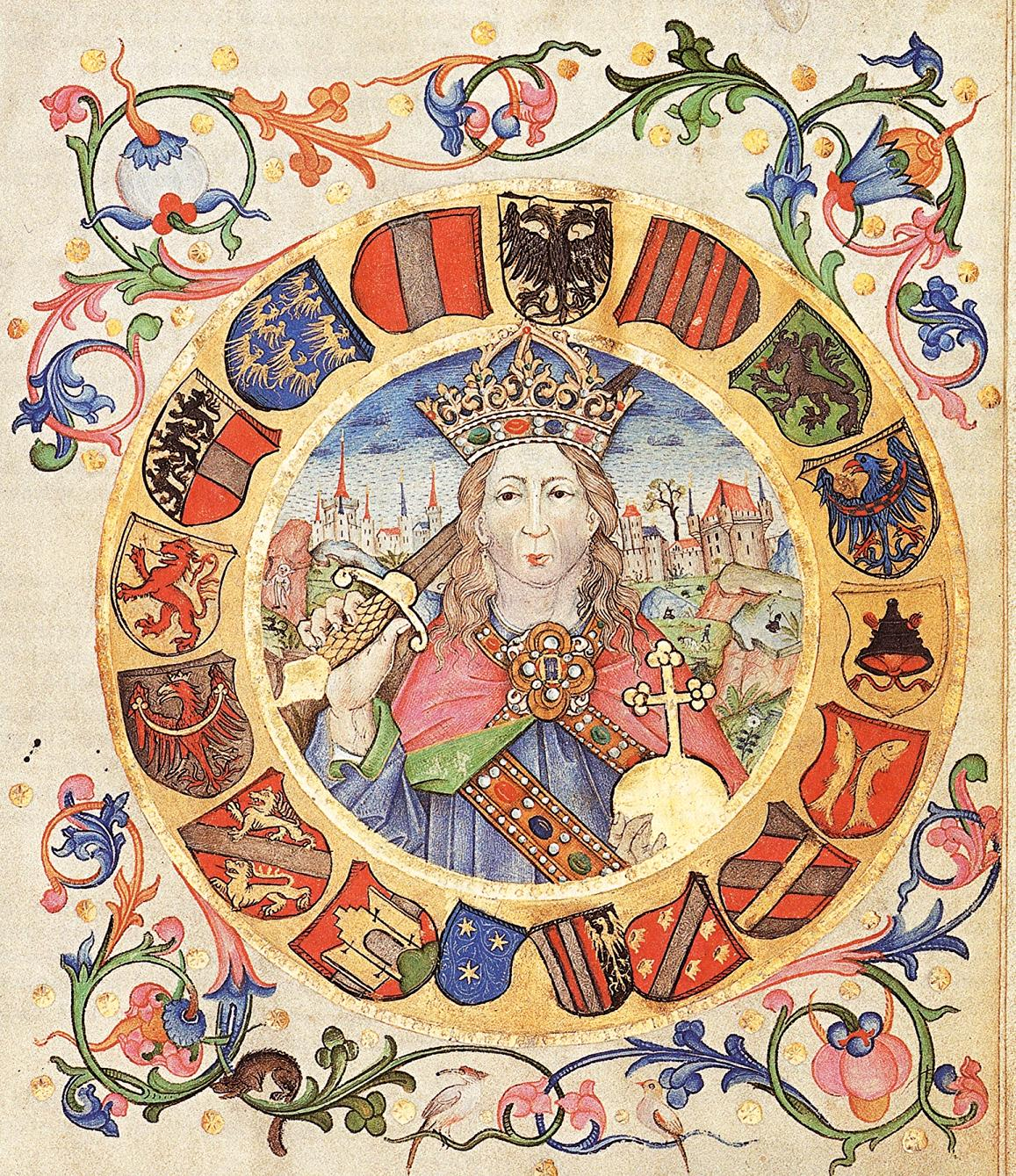 Kaiser Friedrich III. Miniatur im Greiner Marktbuch